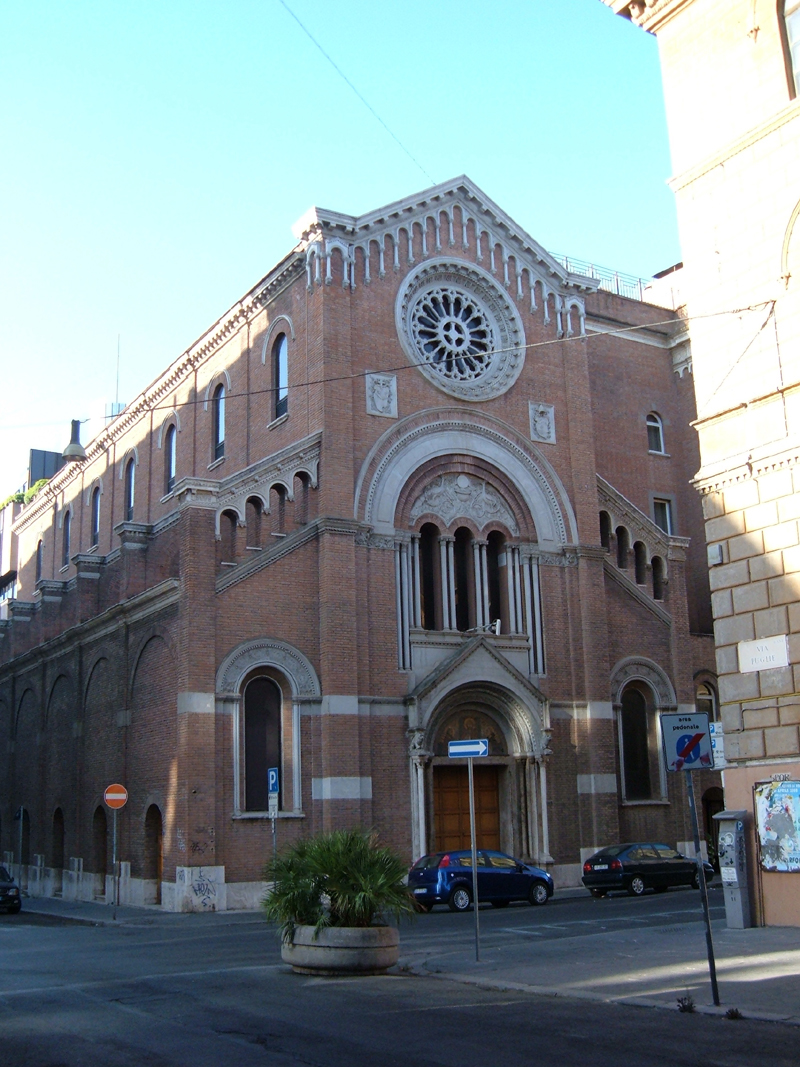 Chiesa sconsacrata di San Lorenzo da Brindisi, a Roma, nel rione Ludovisi. Foto personale.